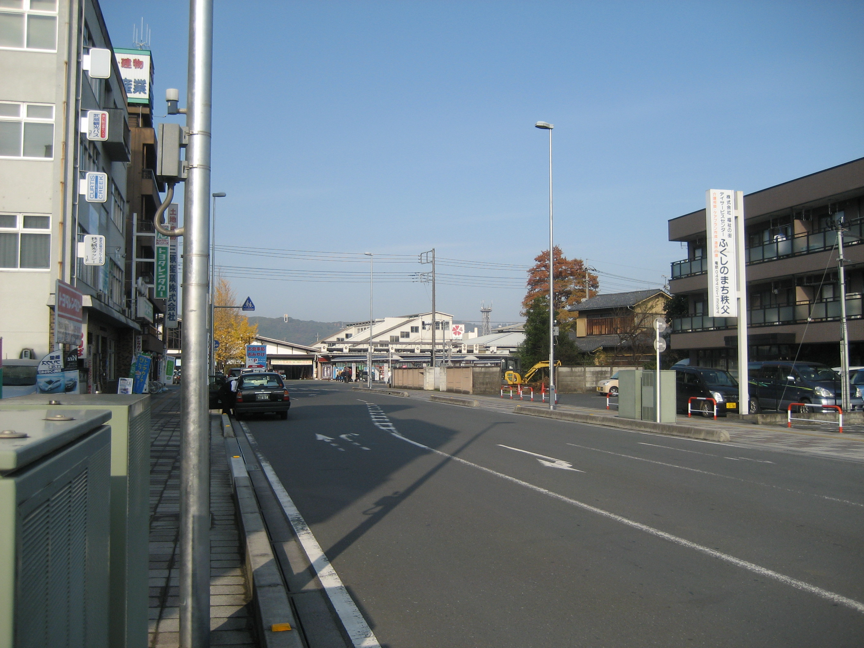 埼玉県道232号線西武秩父駅付近